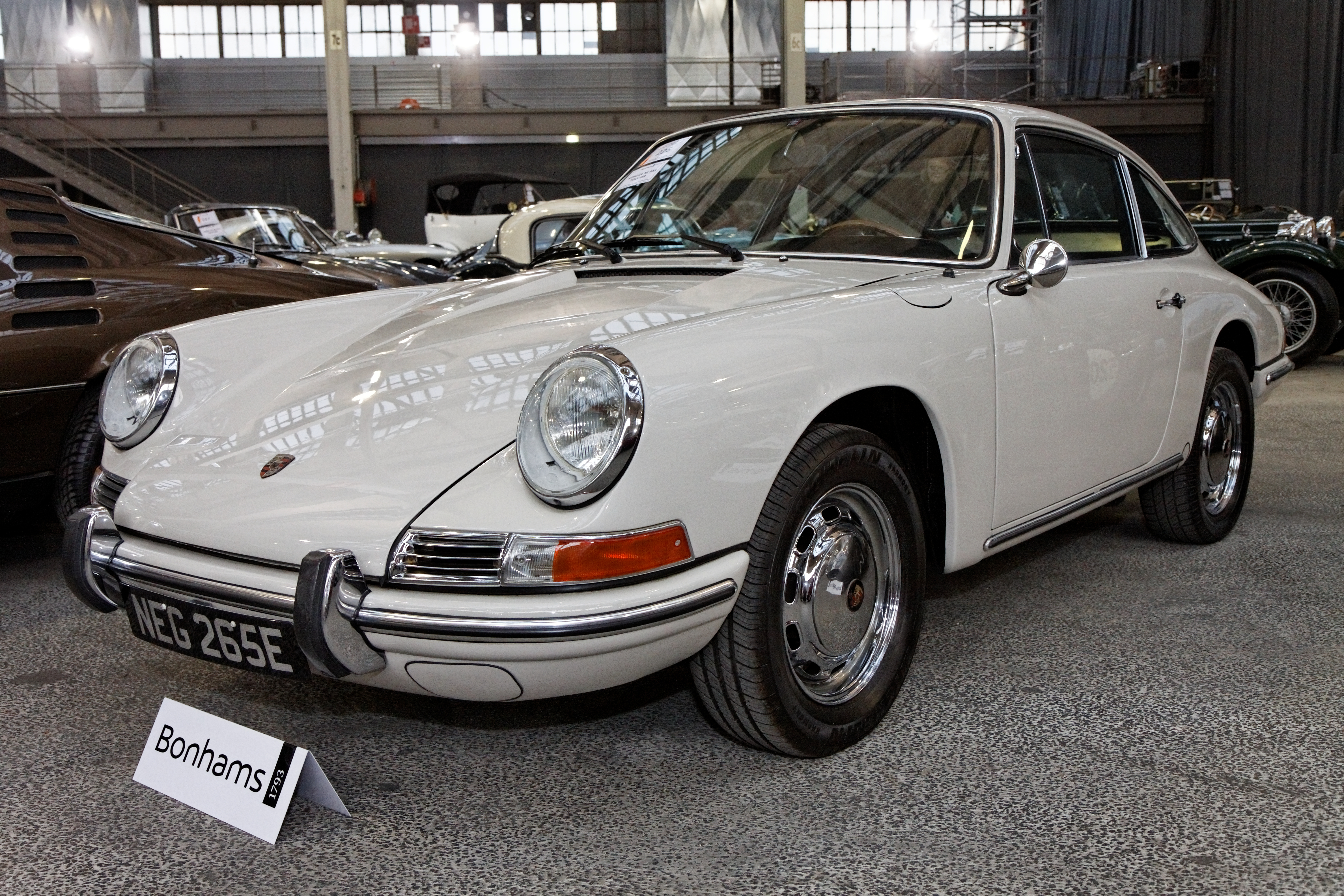 Porsche 912 'SWB' Coupé